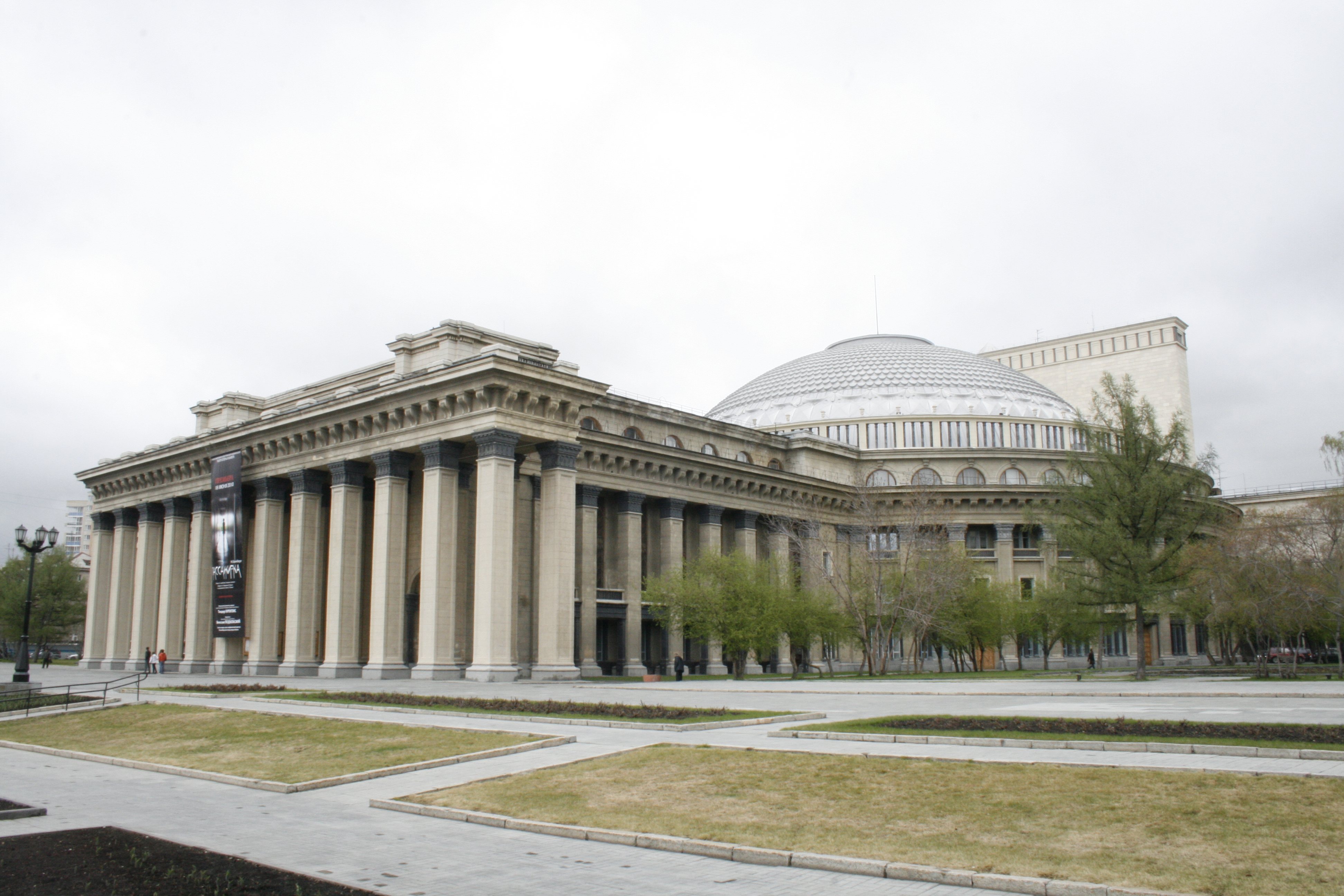 Здание Новосибирского театра оперы и балета (Новосибирская область, Новосибирск, Красный проспект, 36)